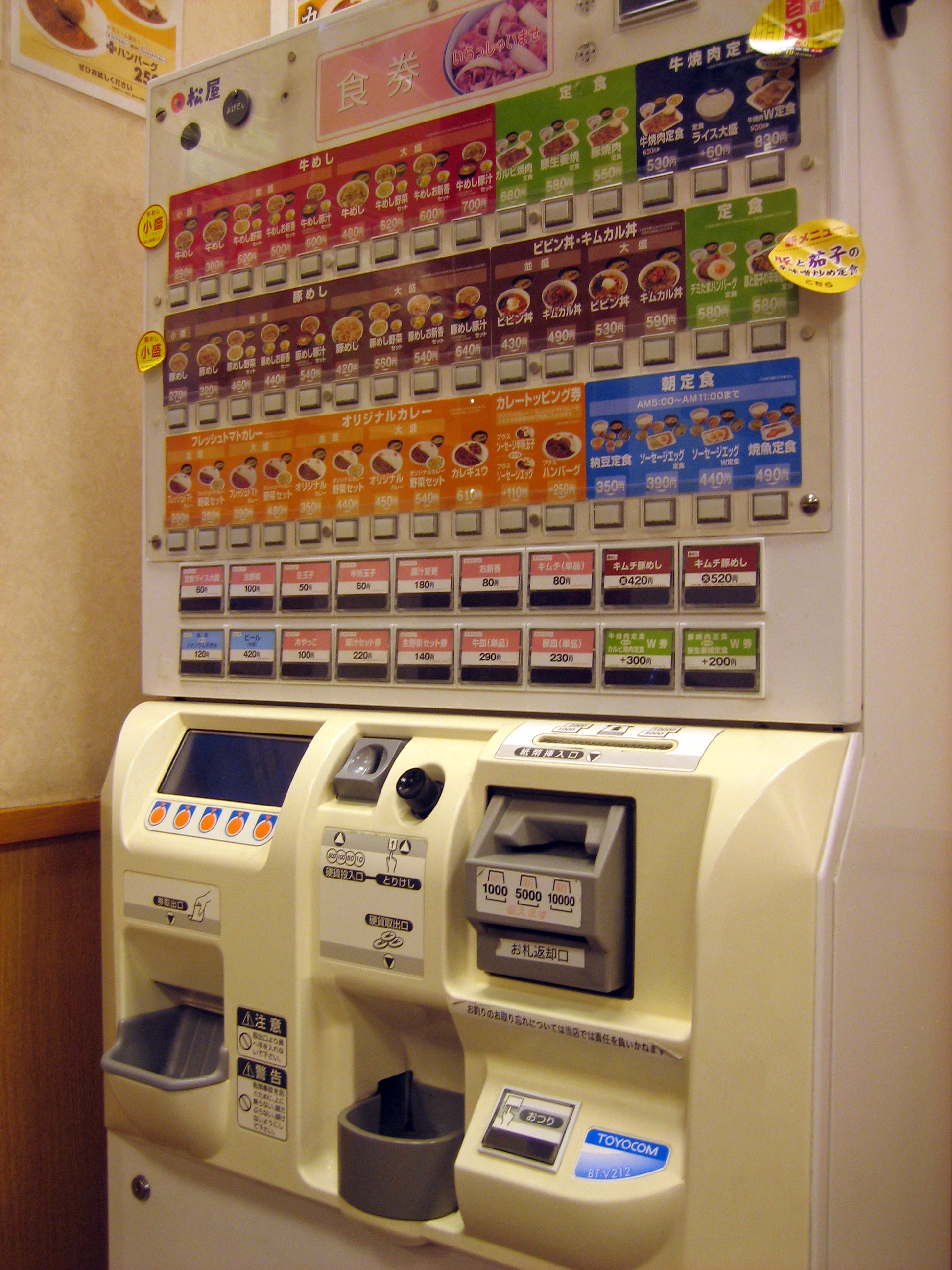 松屋店内にある食券販売機。